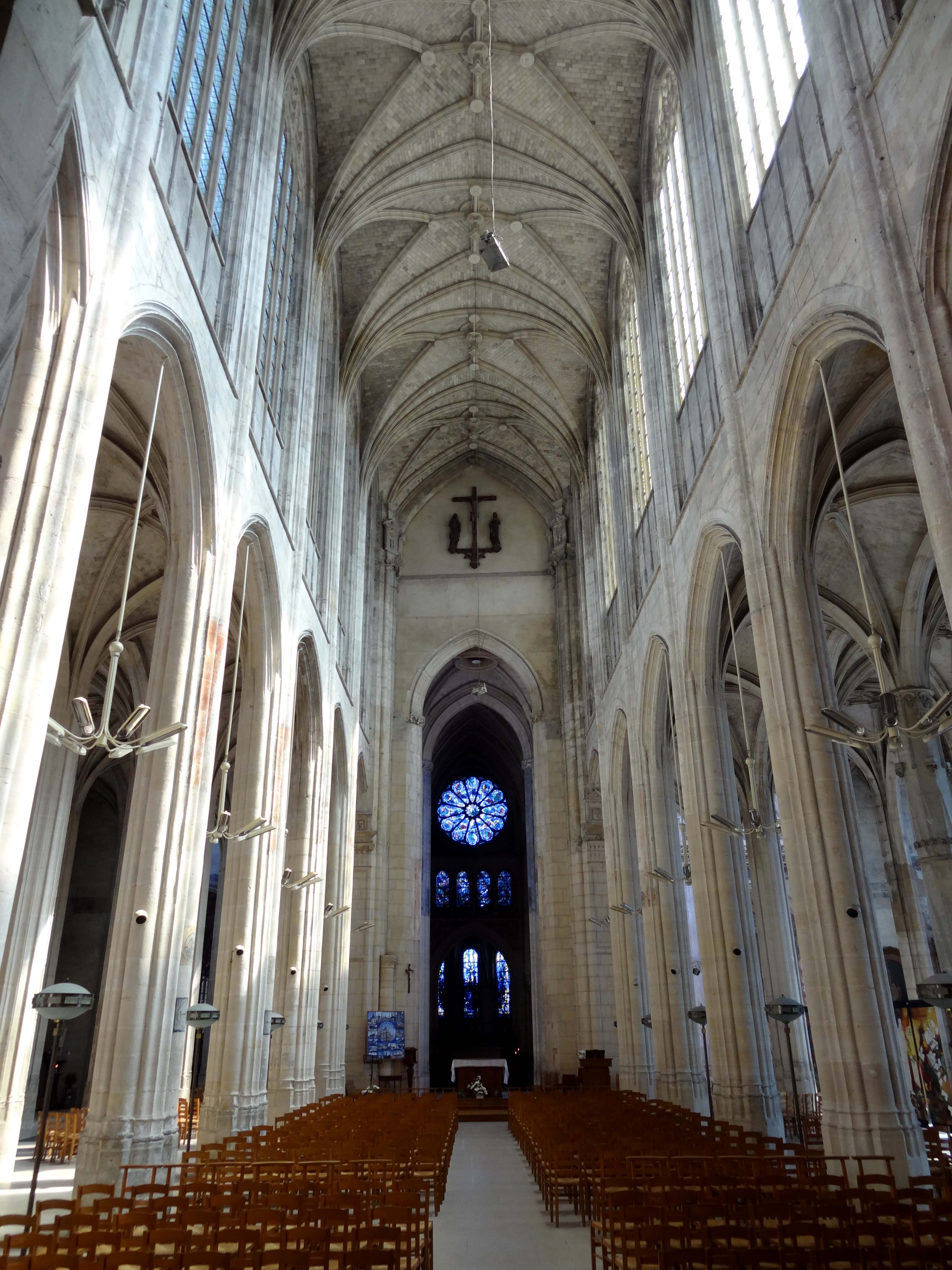 Intérieur de l'église - voir titre.